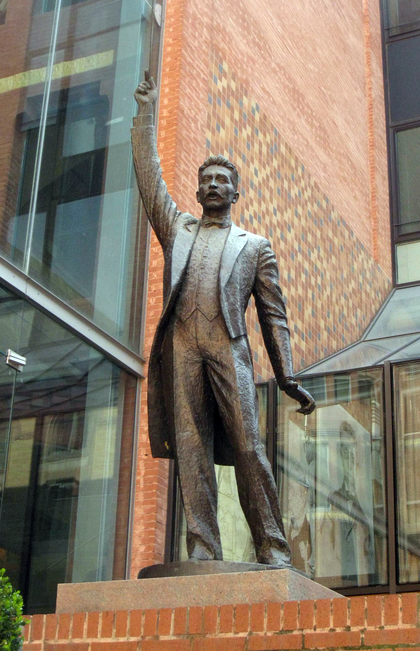 A Lluís Millet (Josep Salvador Jassans). Pl. Lluís Millet (Palau de la Música Catalana) (Barcelona)